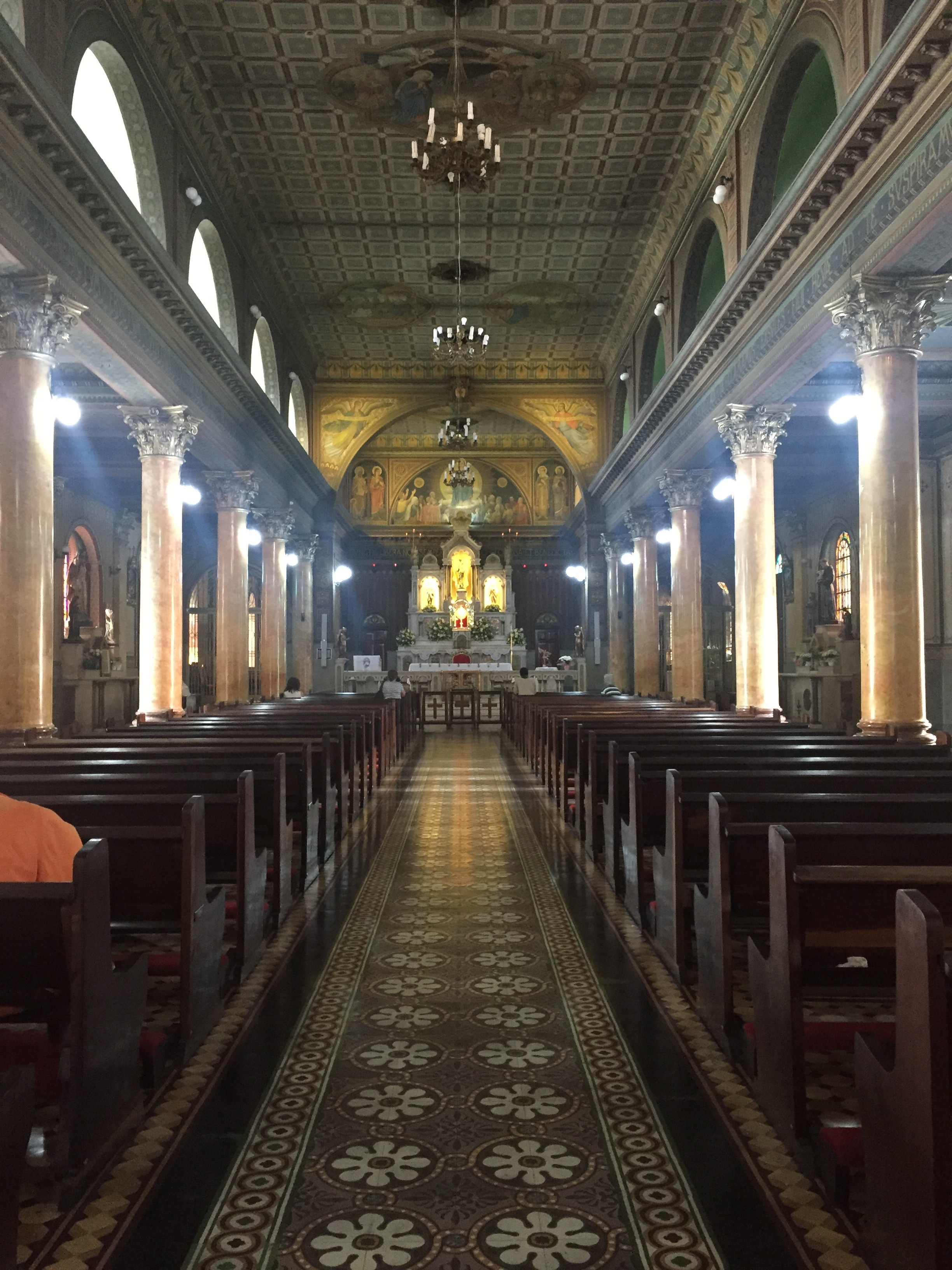 Interior da Igreja Matriz de Nossa Senhora da Penha de França, em São Paulo (SP), Brasil